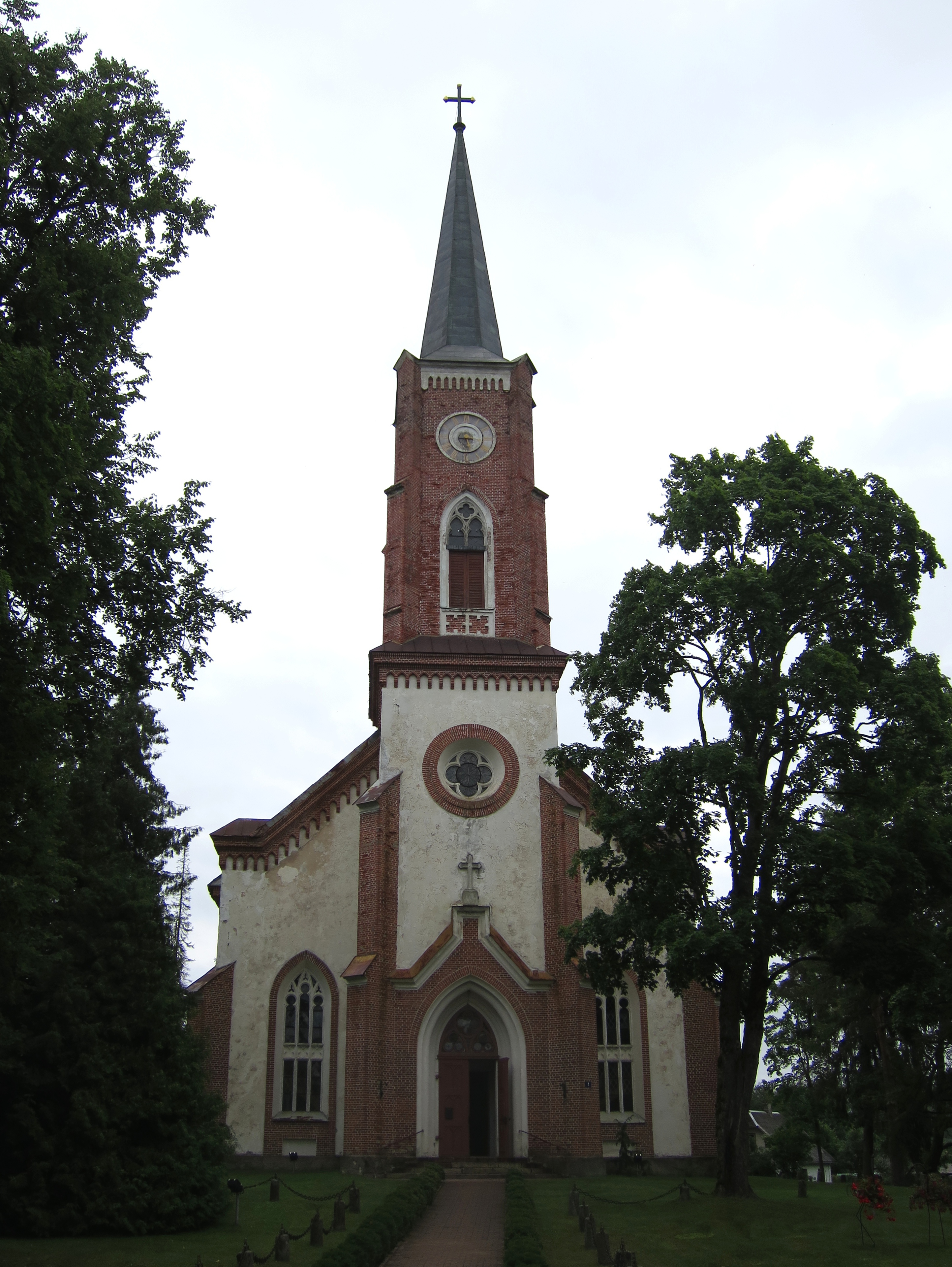 Lubānas luterāņu baznīca